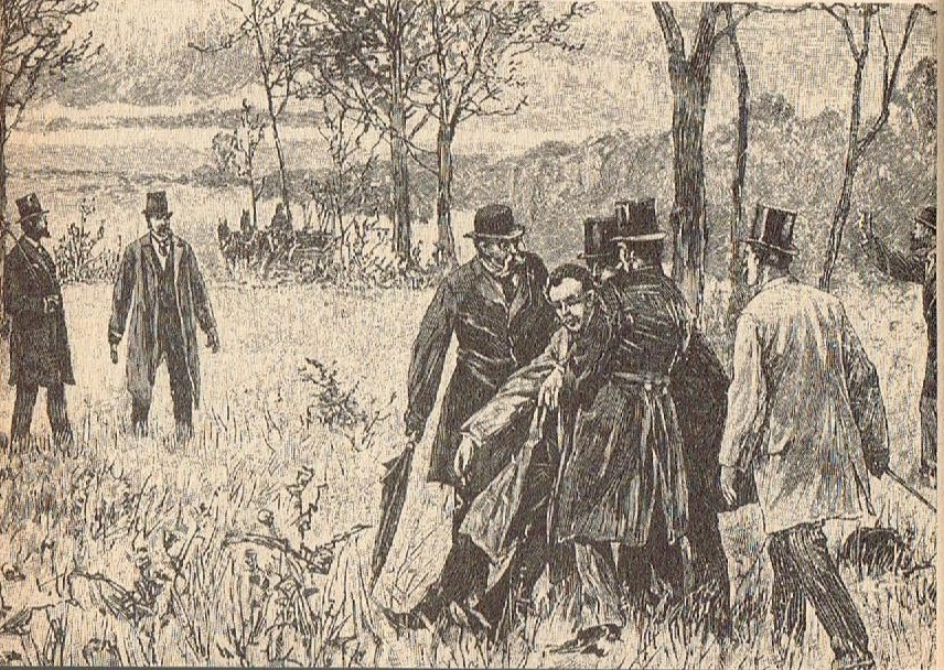 הדו-קרב בו נפצע אנושות